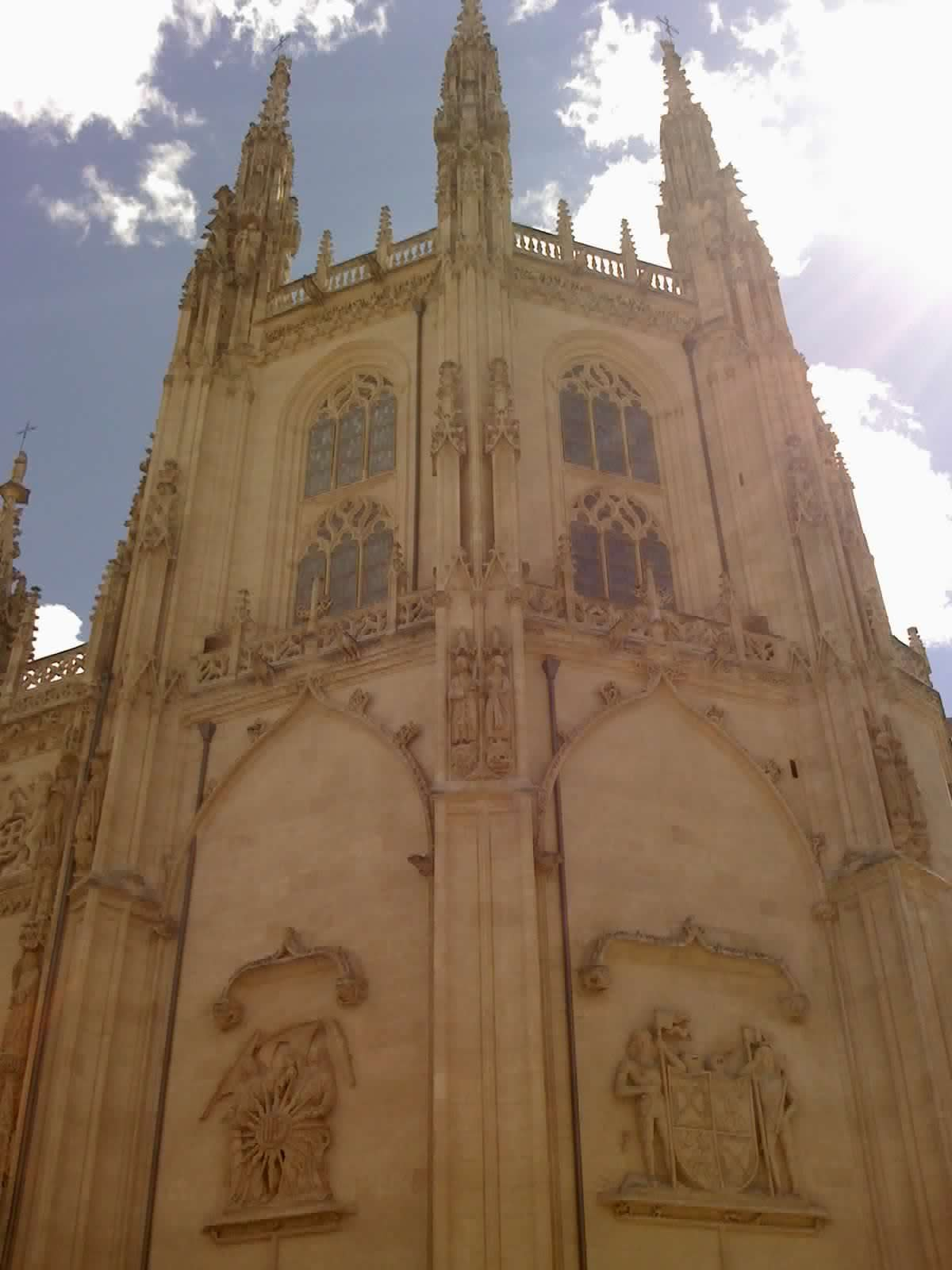 Catedral de Burgos, exterior de la Capilla de los Condestables